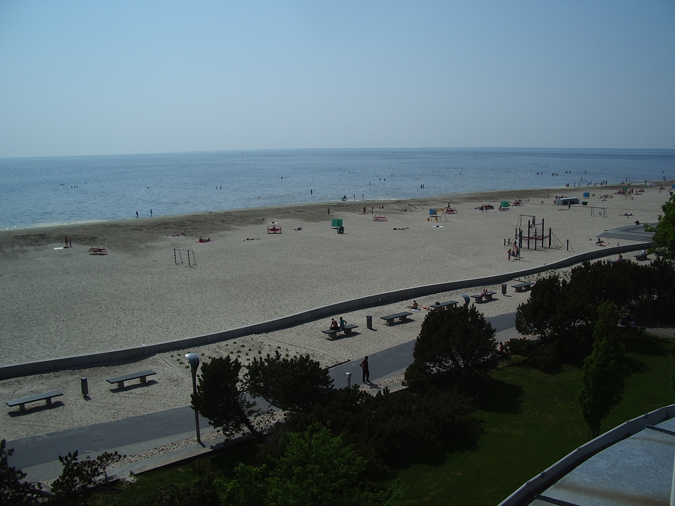 Pärnu rannapromenaad Rannahotellist nähtuna